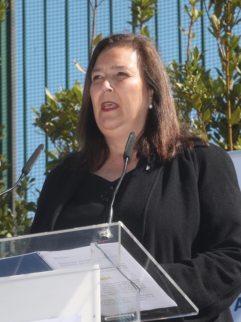 Actos en recuerdo de las victimas del 11M en el 15 aniversario de los atentados.